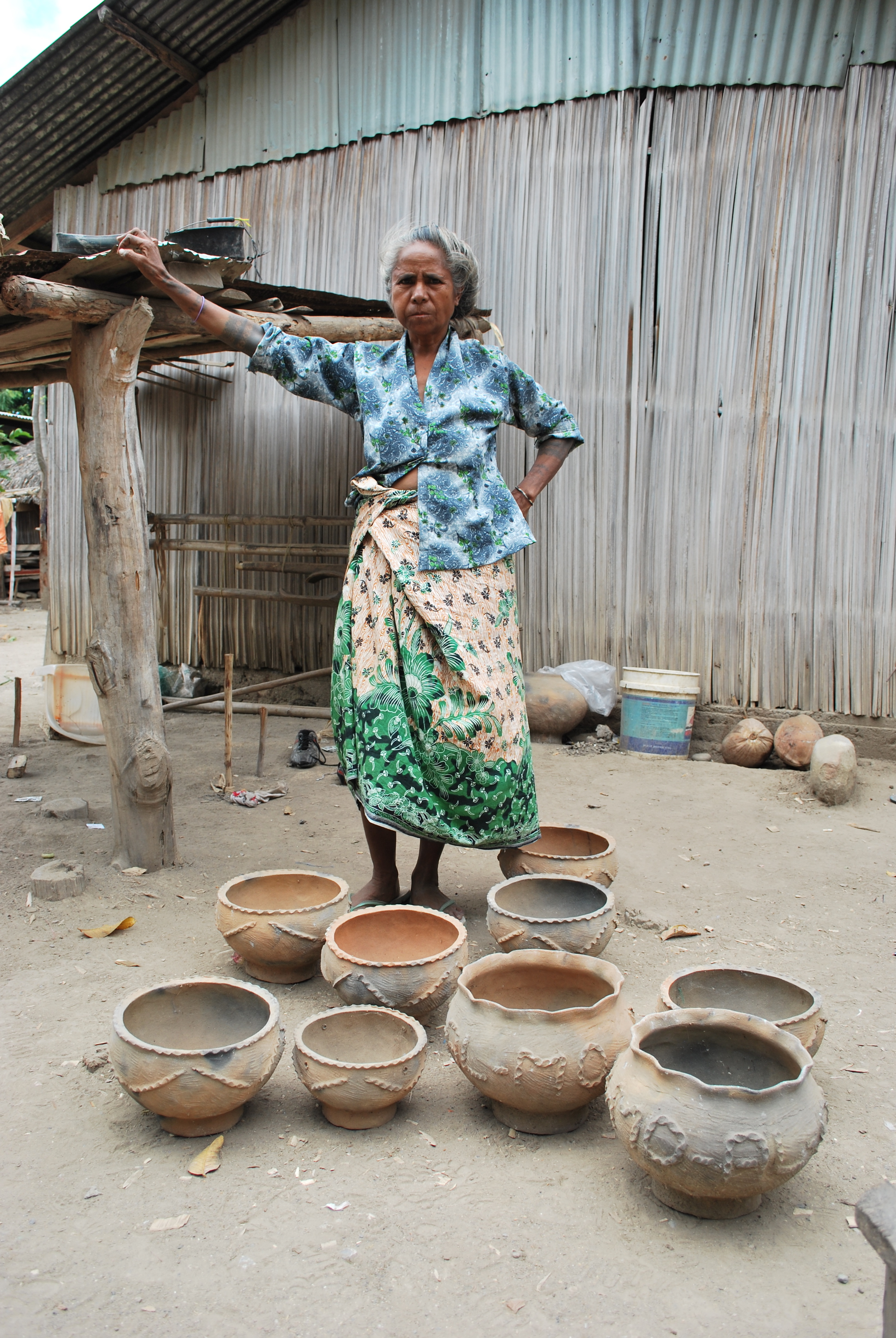 Töpferware in Cova Lima